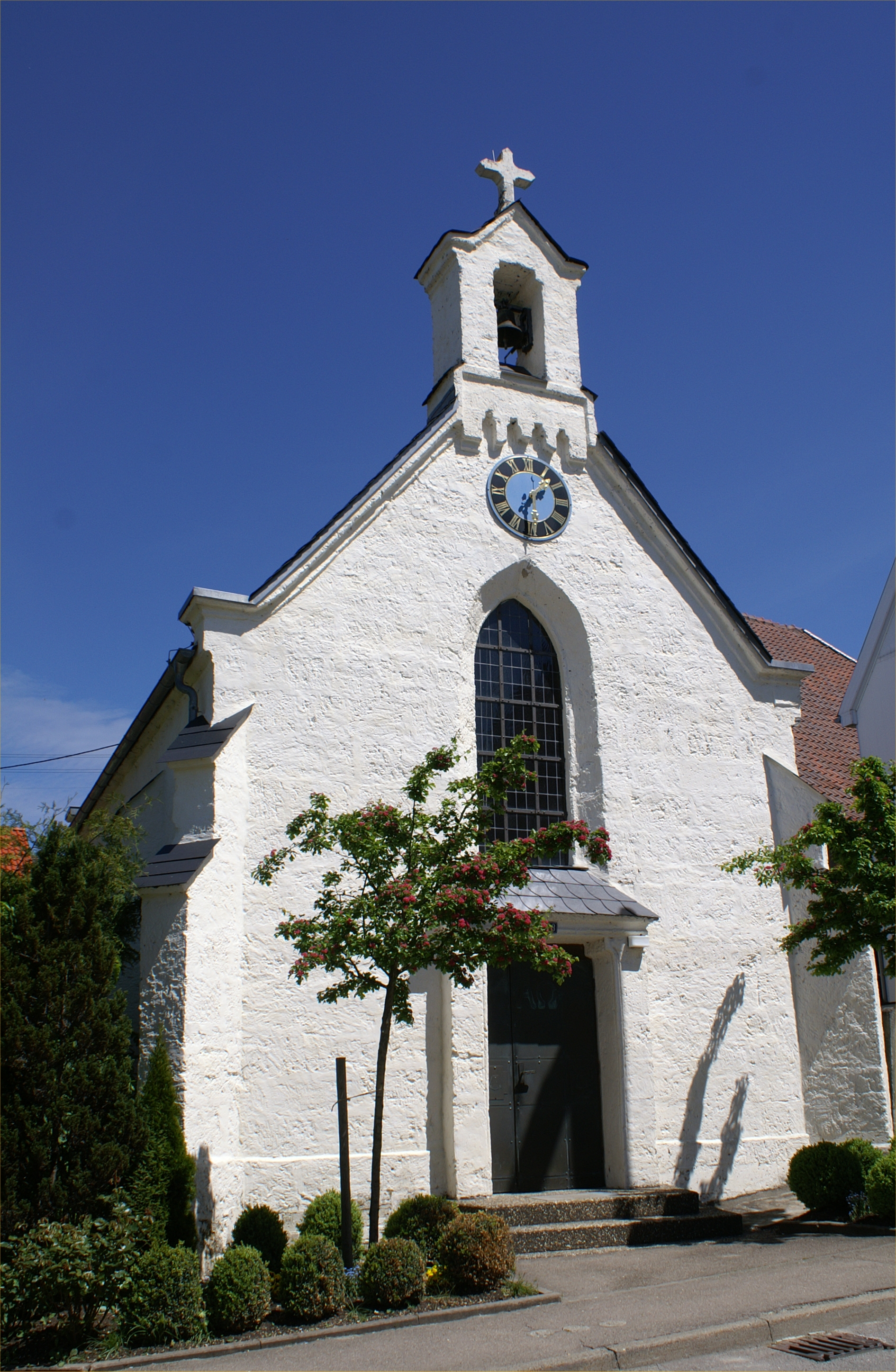 Kirche in Oberdrackenstein im Landkreis Göppingen